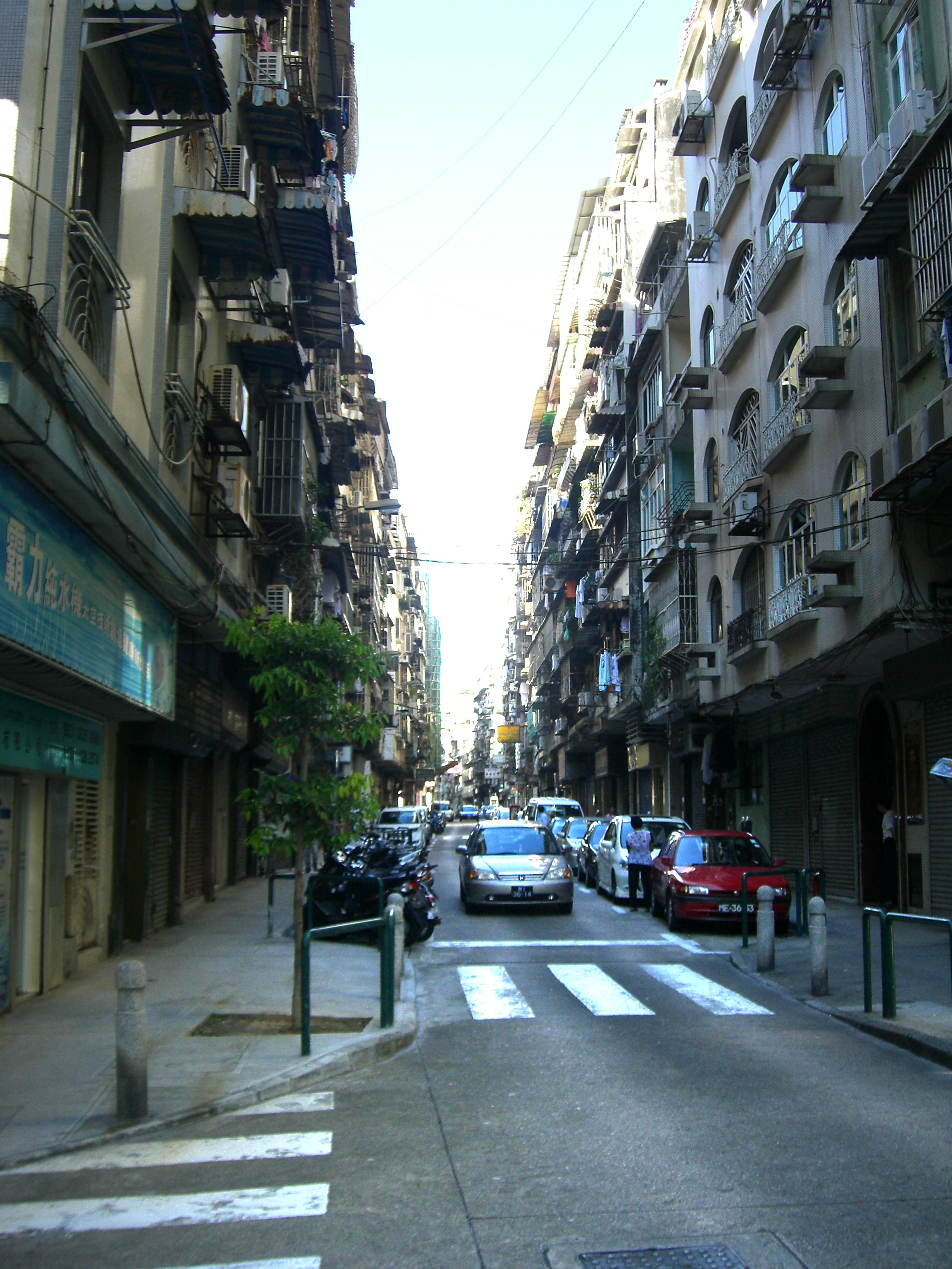 Rua Nova à Guia